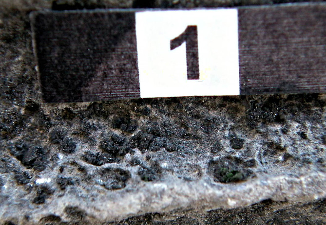 So genannter Makropit als Schadensbild auf einem Marmorwerkstein des Apollon-Tempels in Didyma/Türkei.